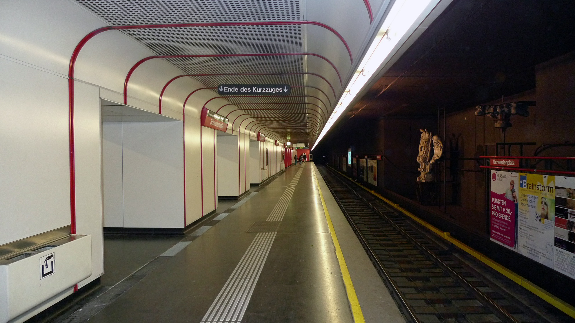 Vienna